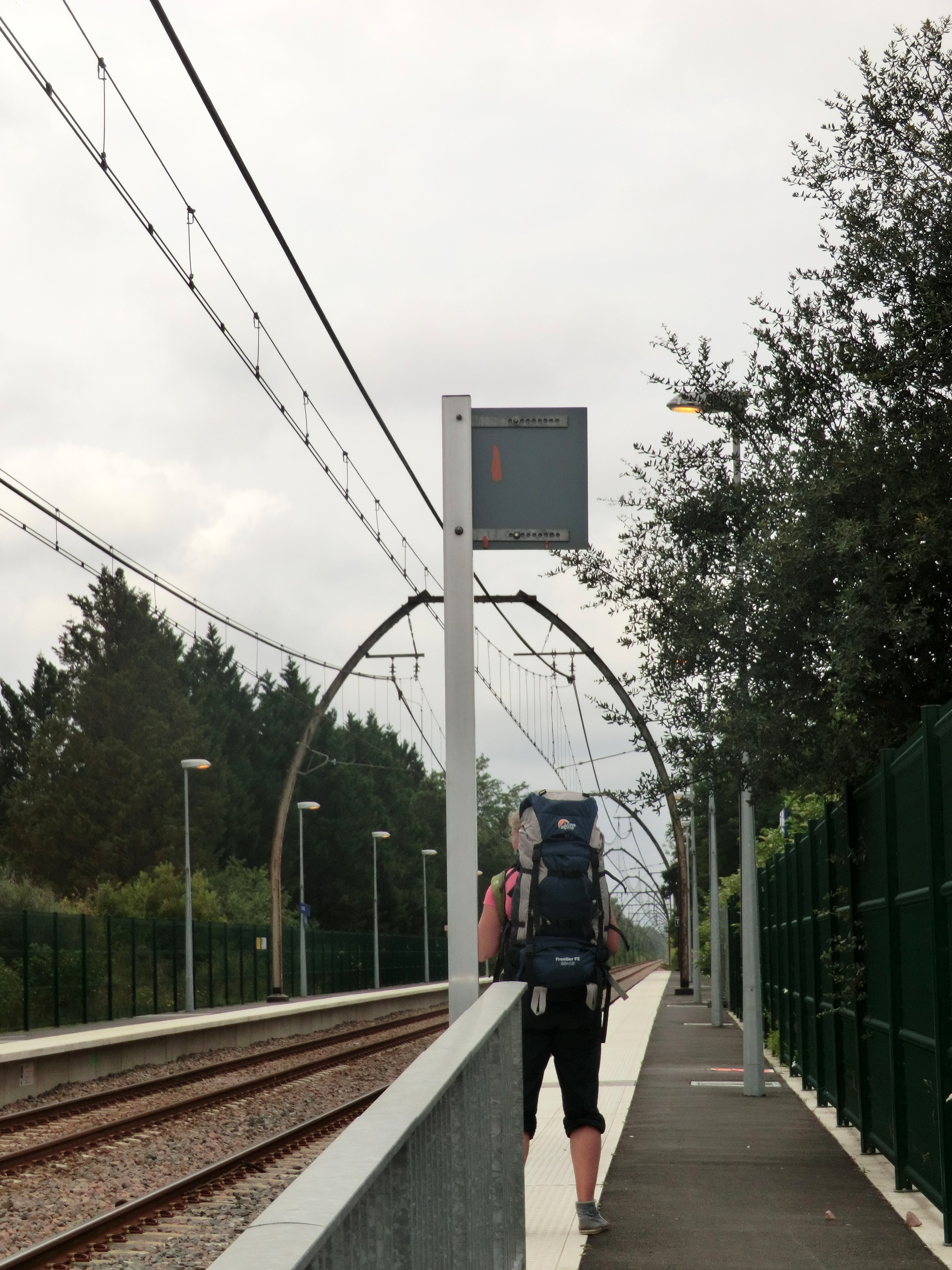 Quai de la gare d'Ondres.